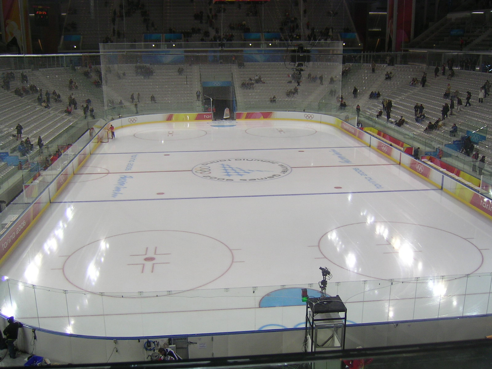 Il PalaIsozaki a Torino